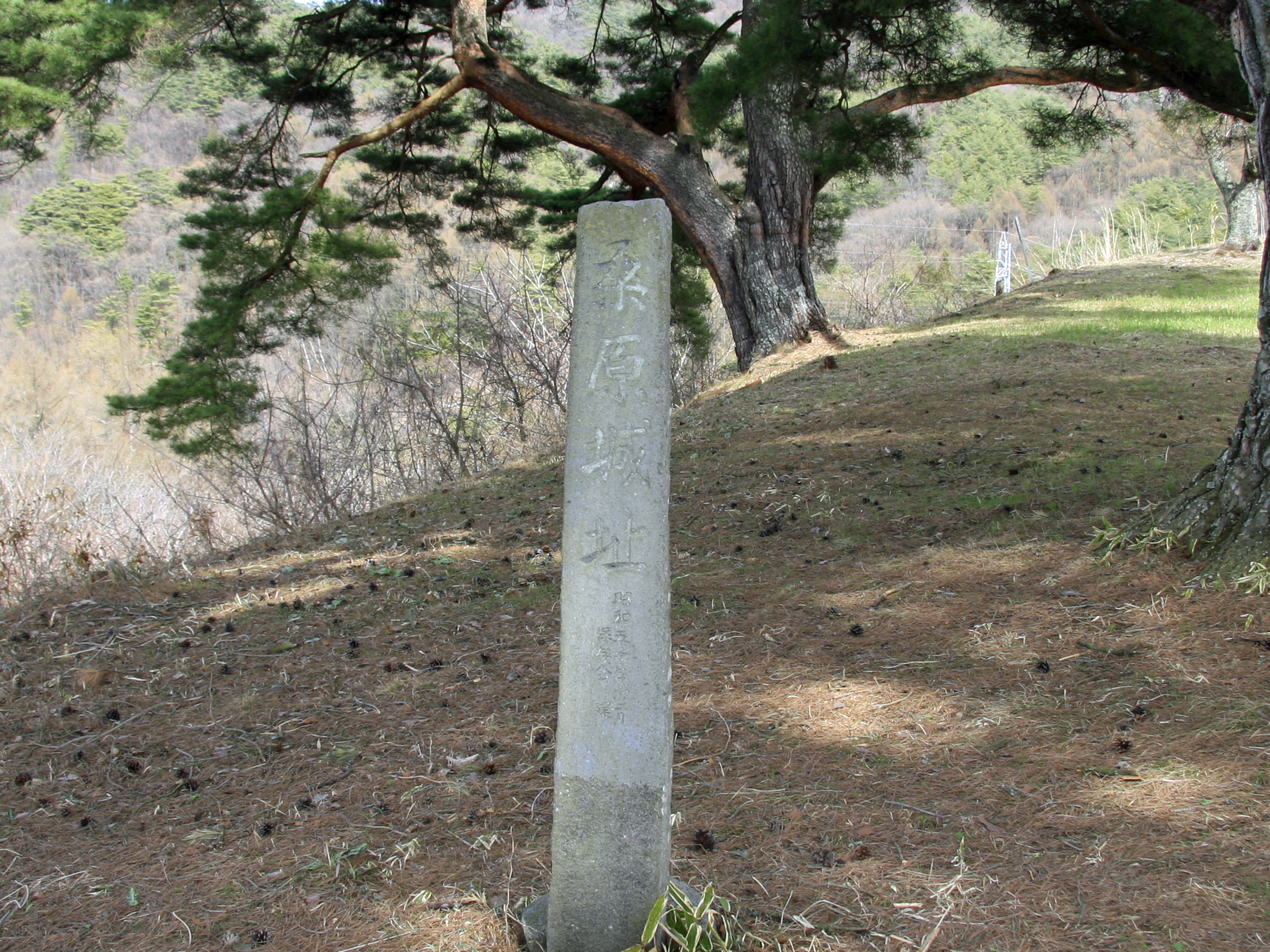 桑原城の石碑